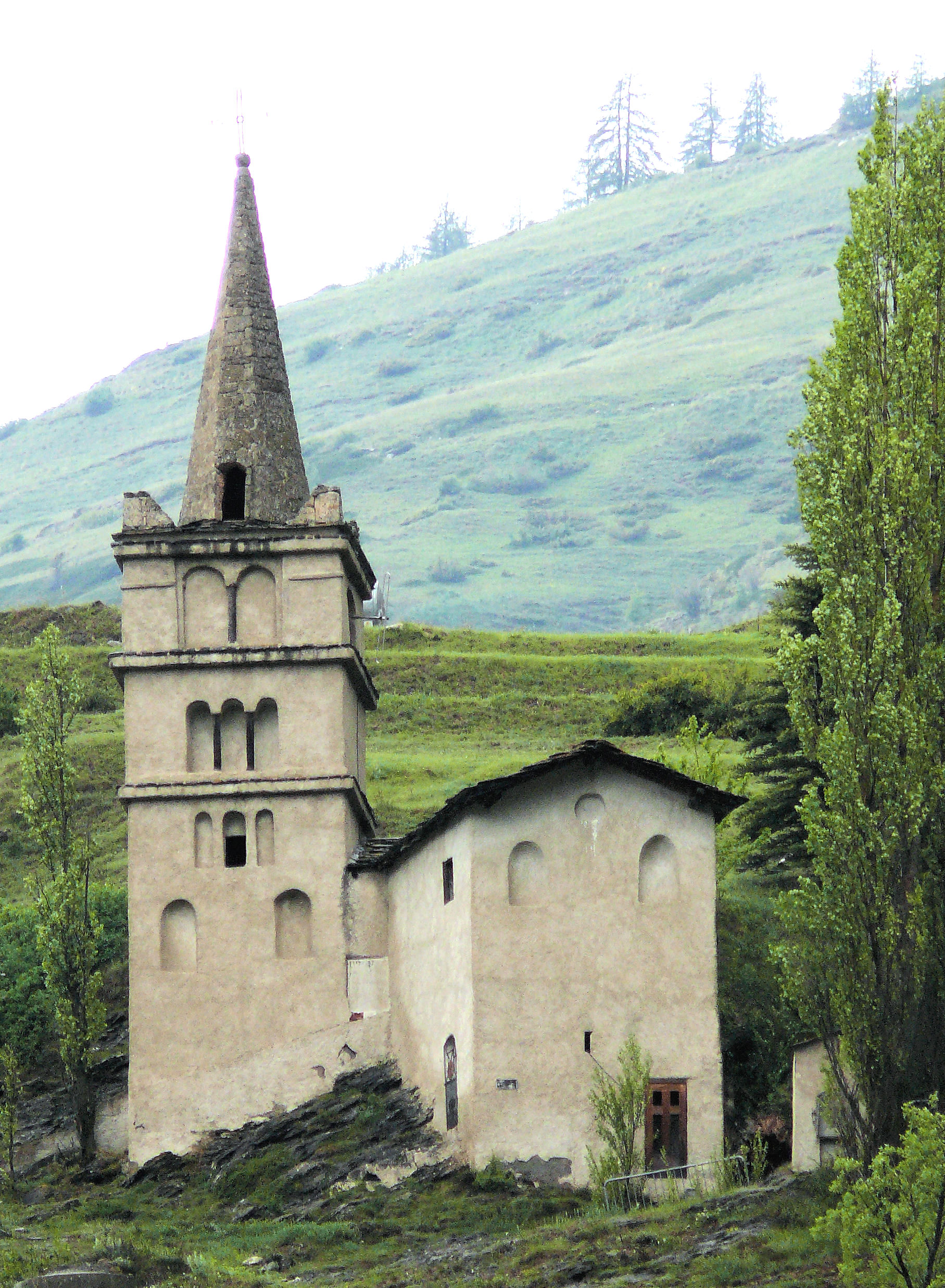 Abriès - Église Saint-Pierre-Saint-Paul-et-Saint-Antoine